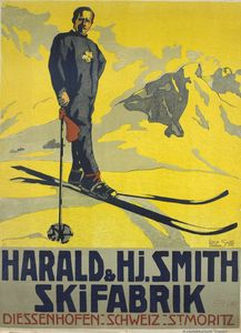 Affiche pour la Harald Smith Skifabrik (environ 1905)